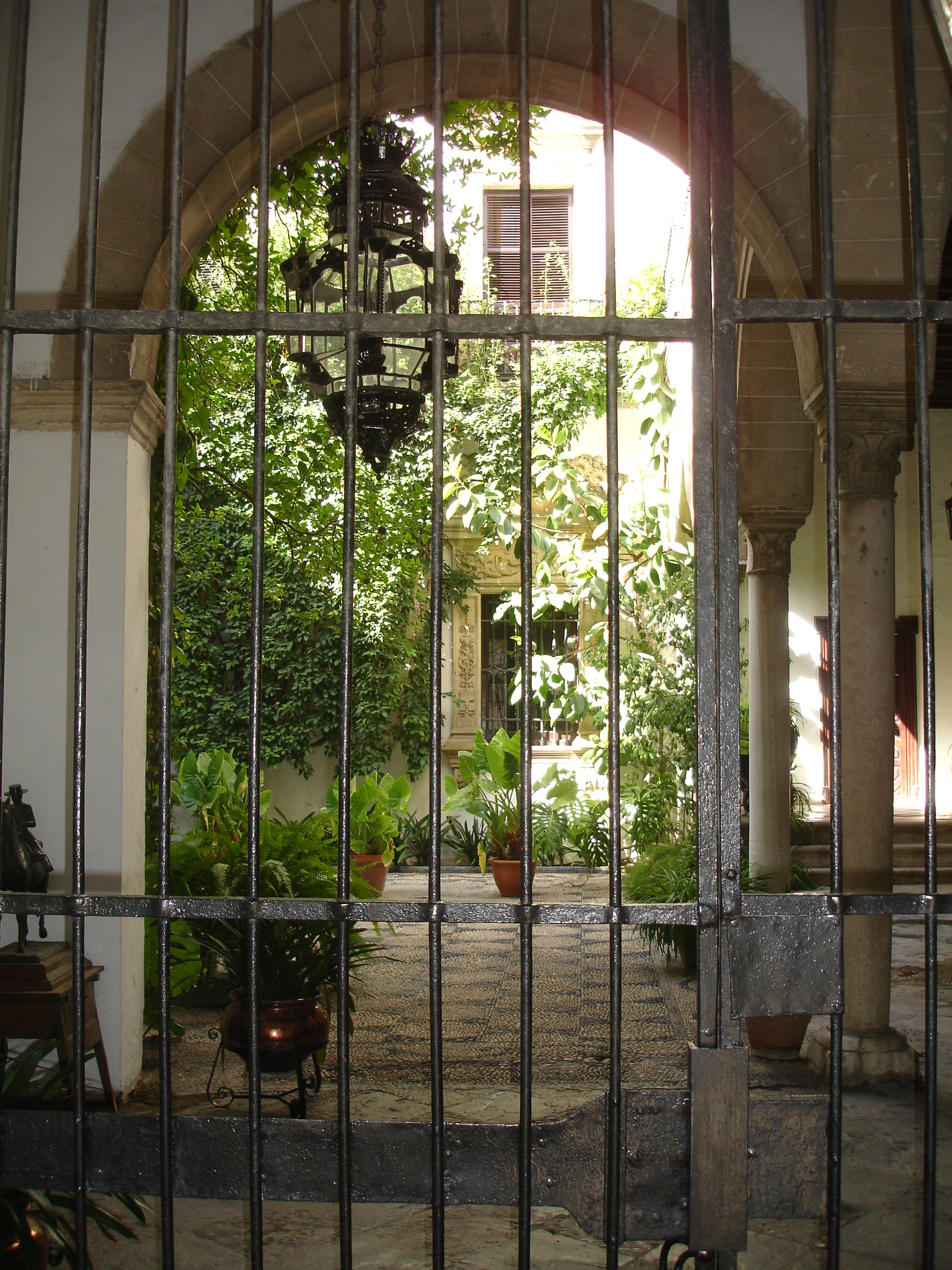 Casa Petra de la Riva. Jerez de la Frontera, Andalusia (Spain)